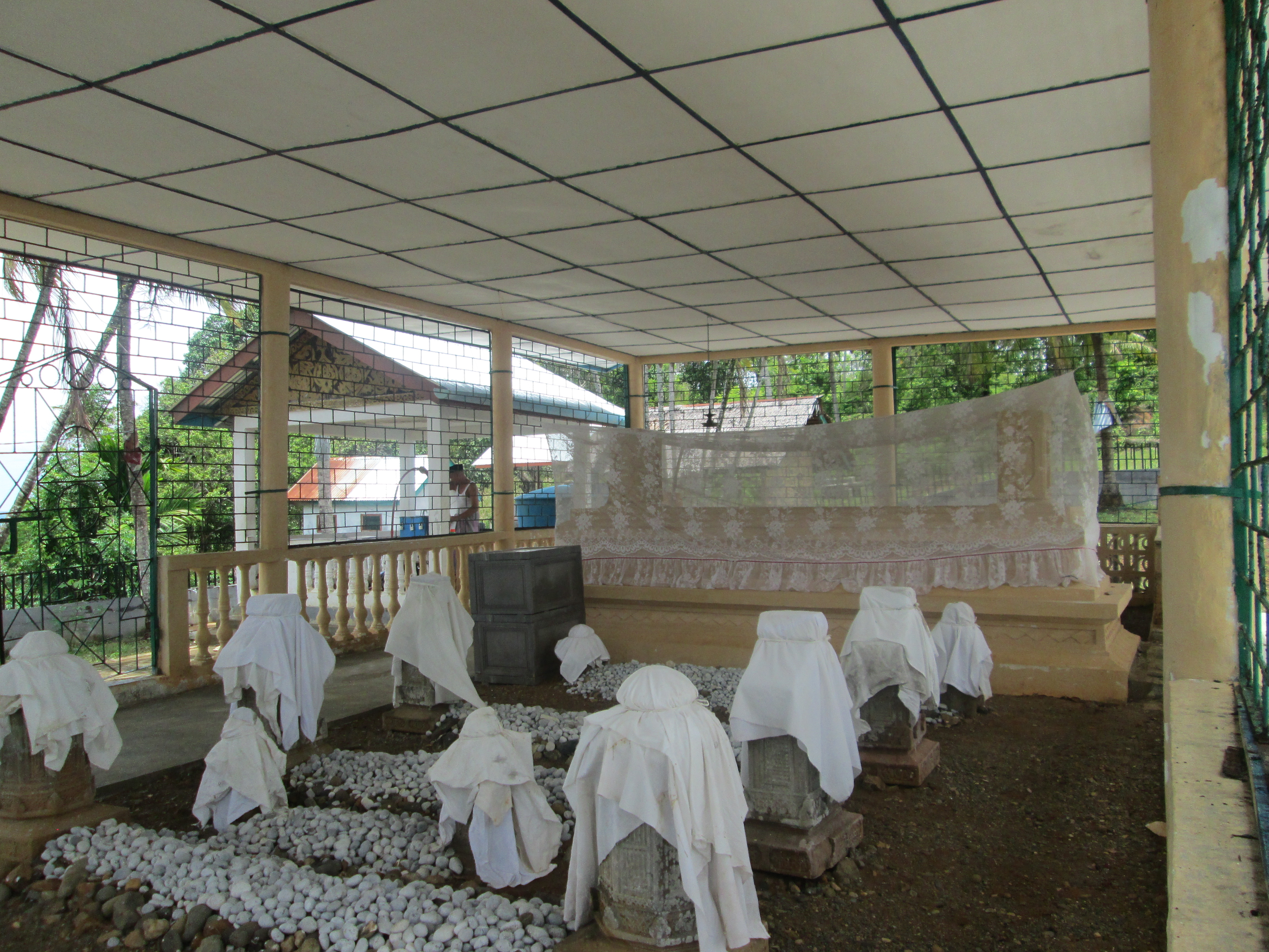 Makam Poteu Meureuhôm Lam No, Sultan Salatin